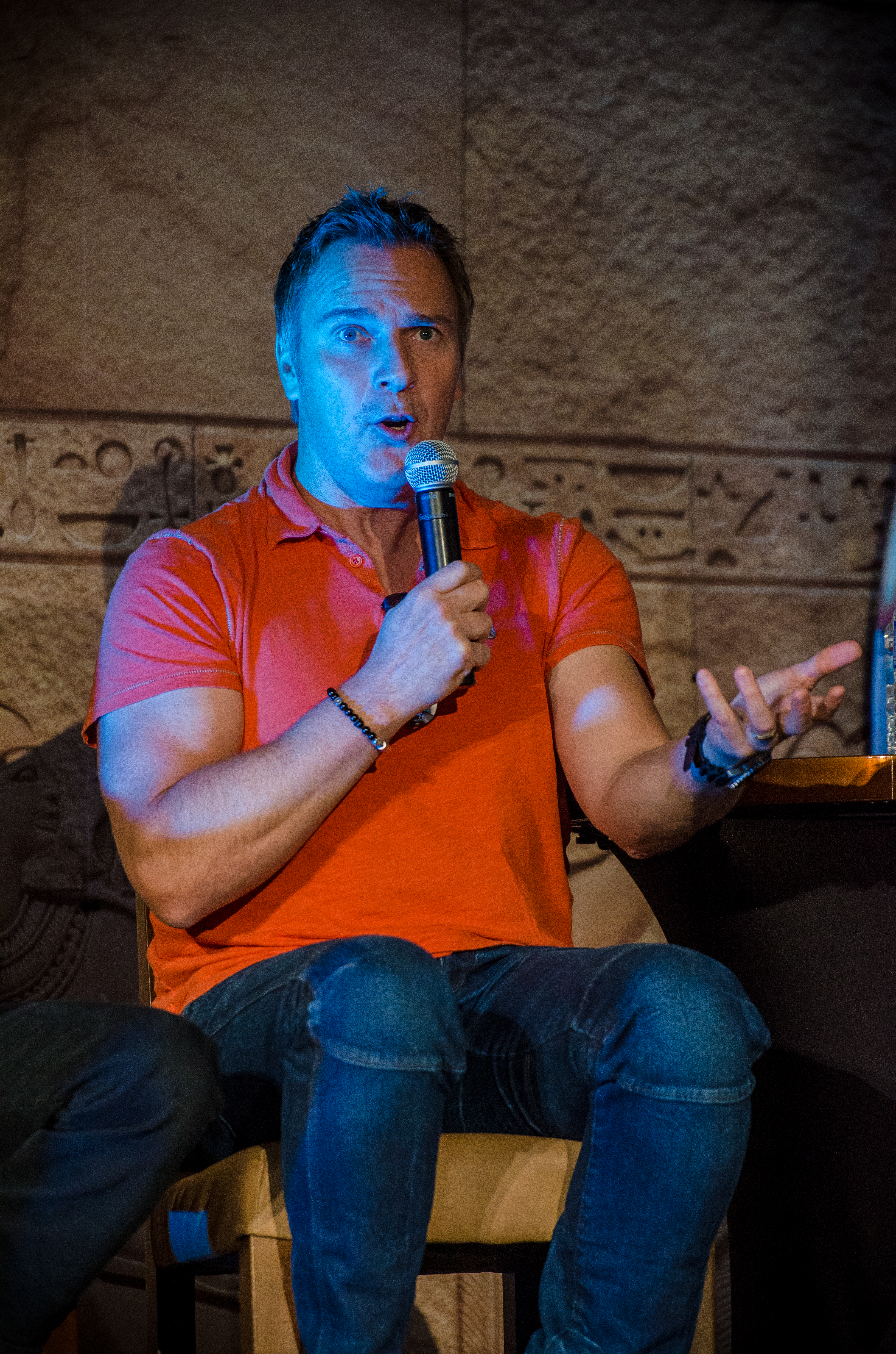 Mike Dupod [2]